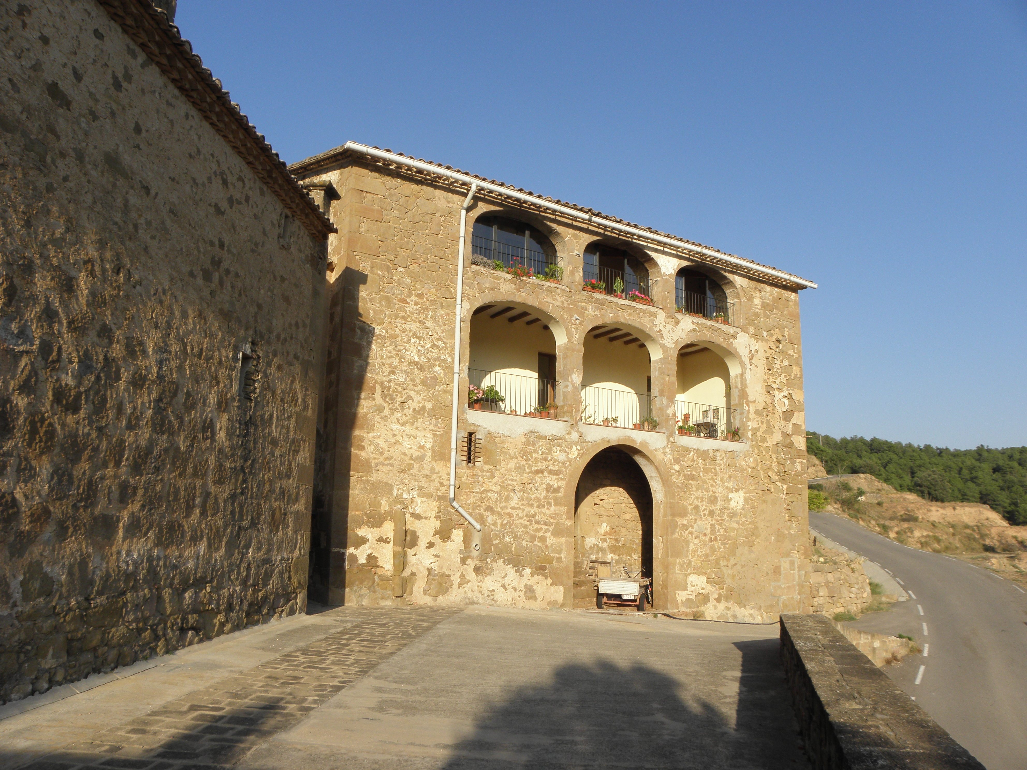 La façana sud-occidental de la rectoria de Madrona (Pinell de Solsonès).